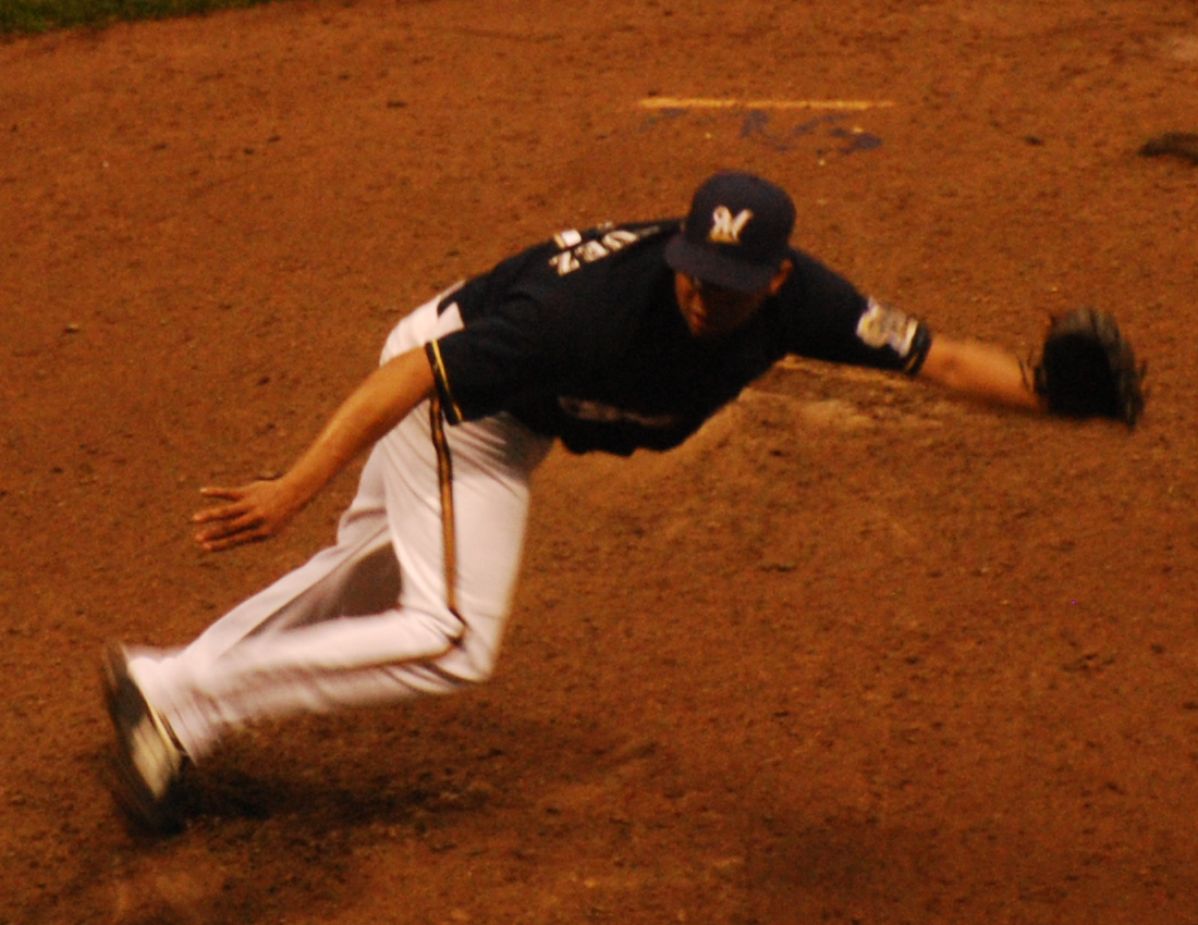 Francisco Rodríguez